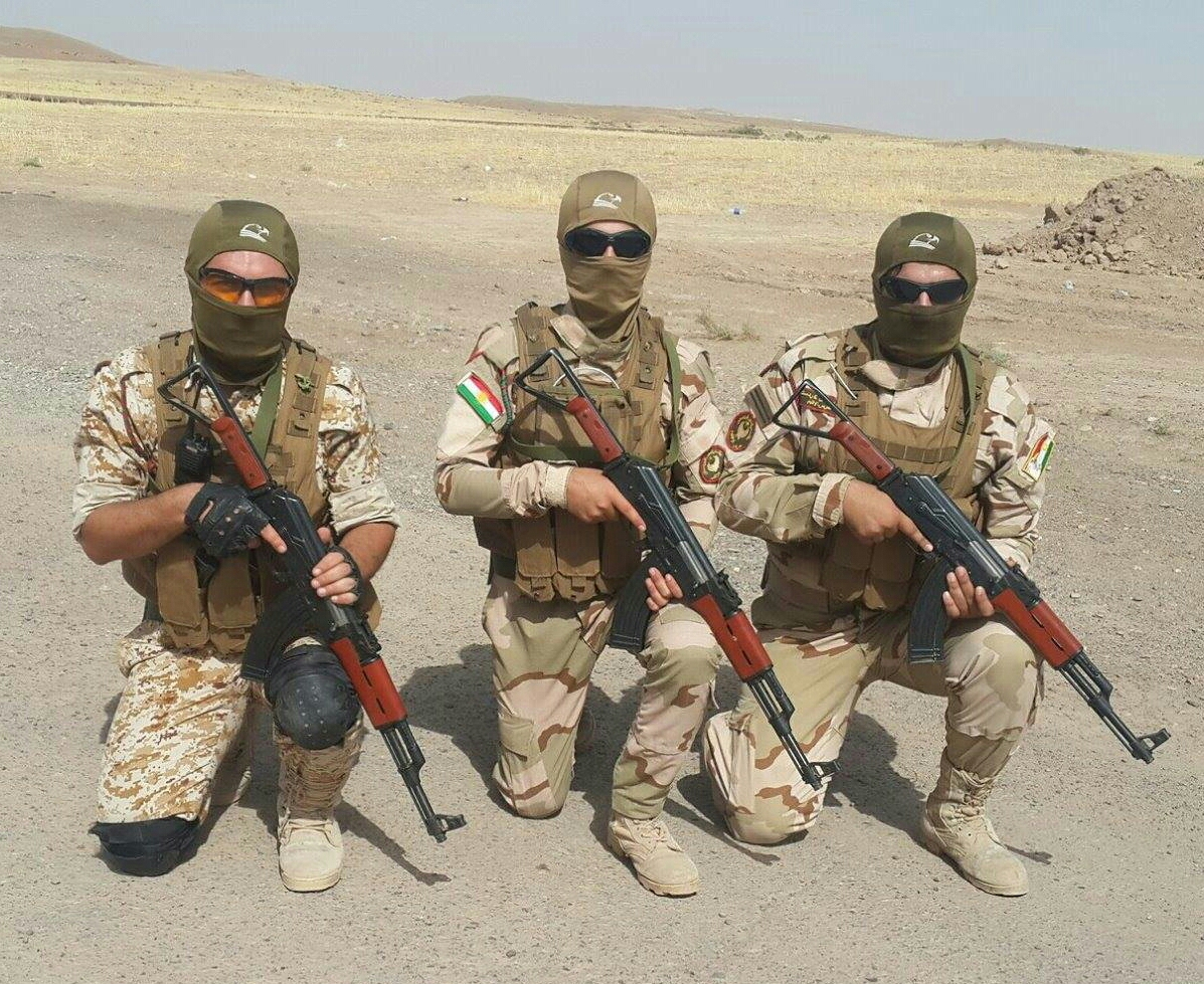 PUK Peshmerga in Mosul YPG